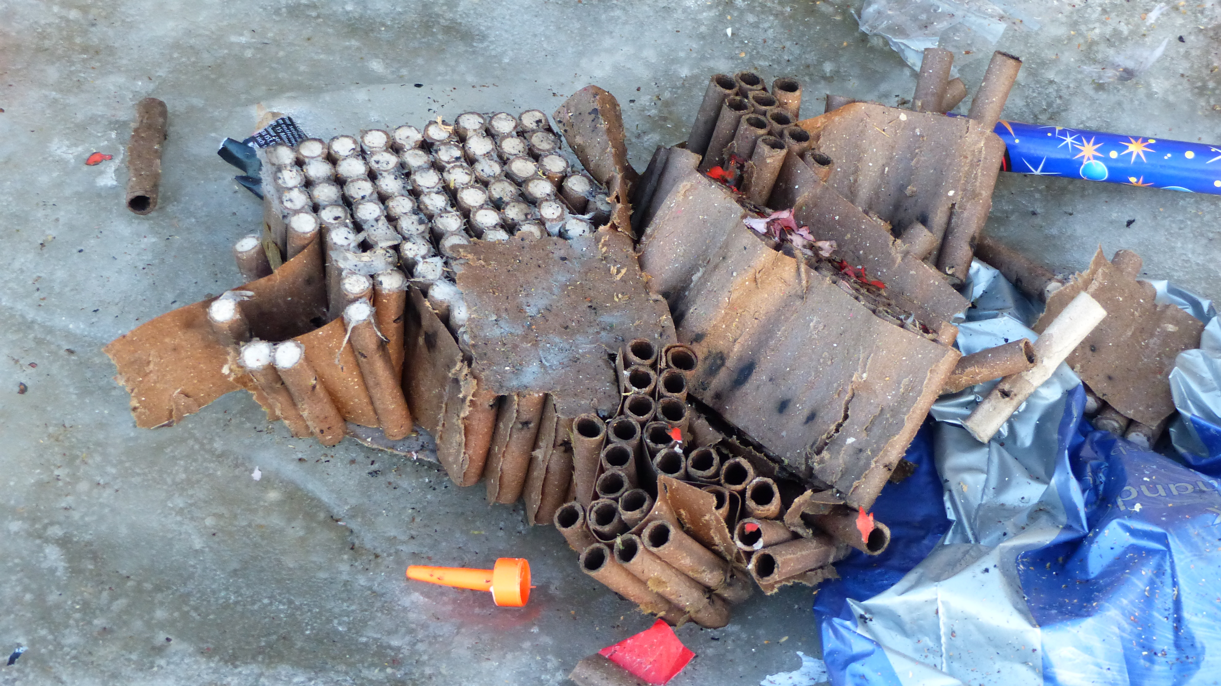 Silvester-Böller-Reste am Schloss Moritzburg